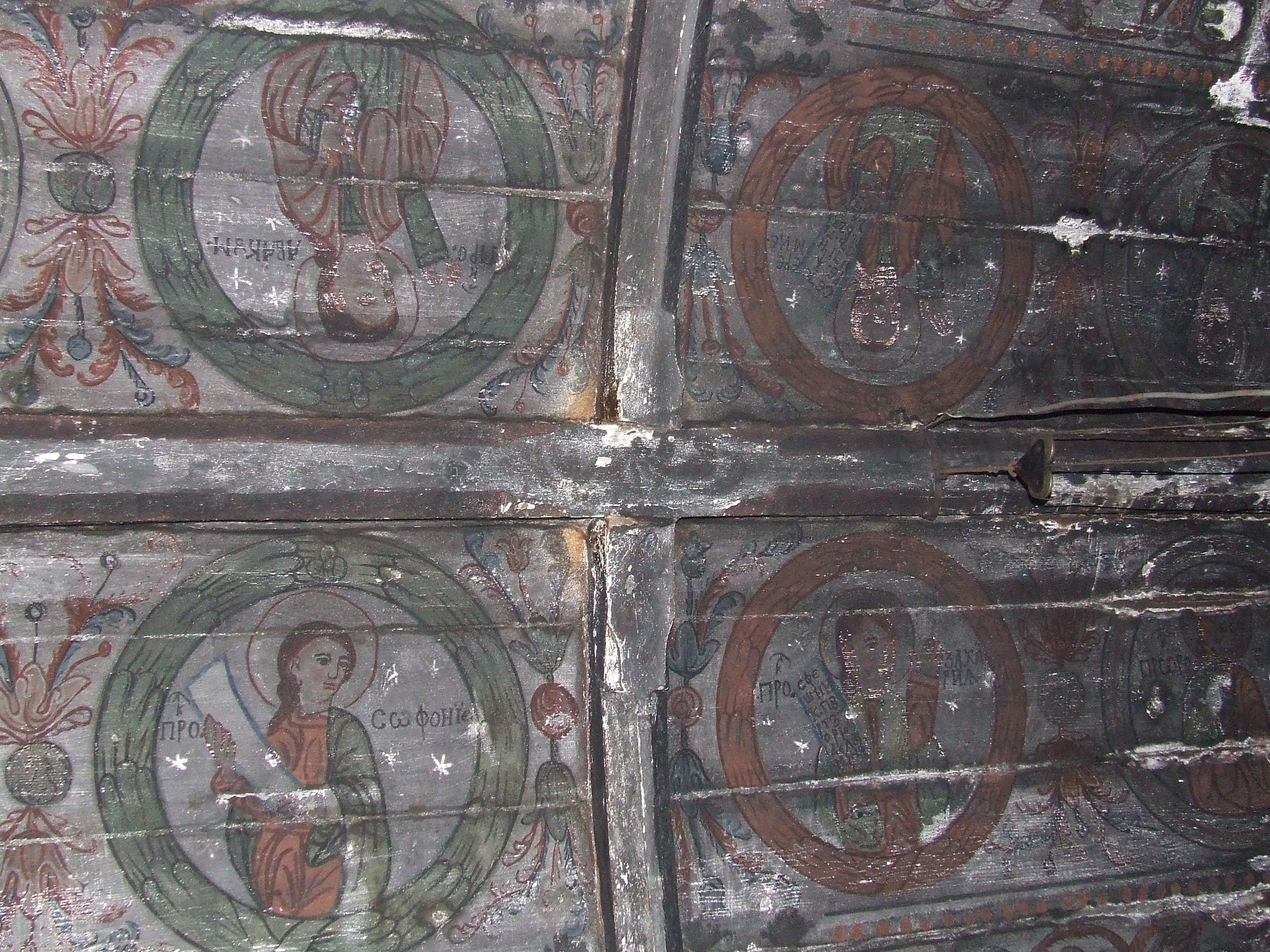 Biserica de lemn din Sânpaul. Intersecţie pe bolta naosului.